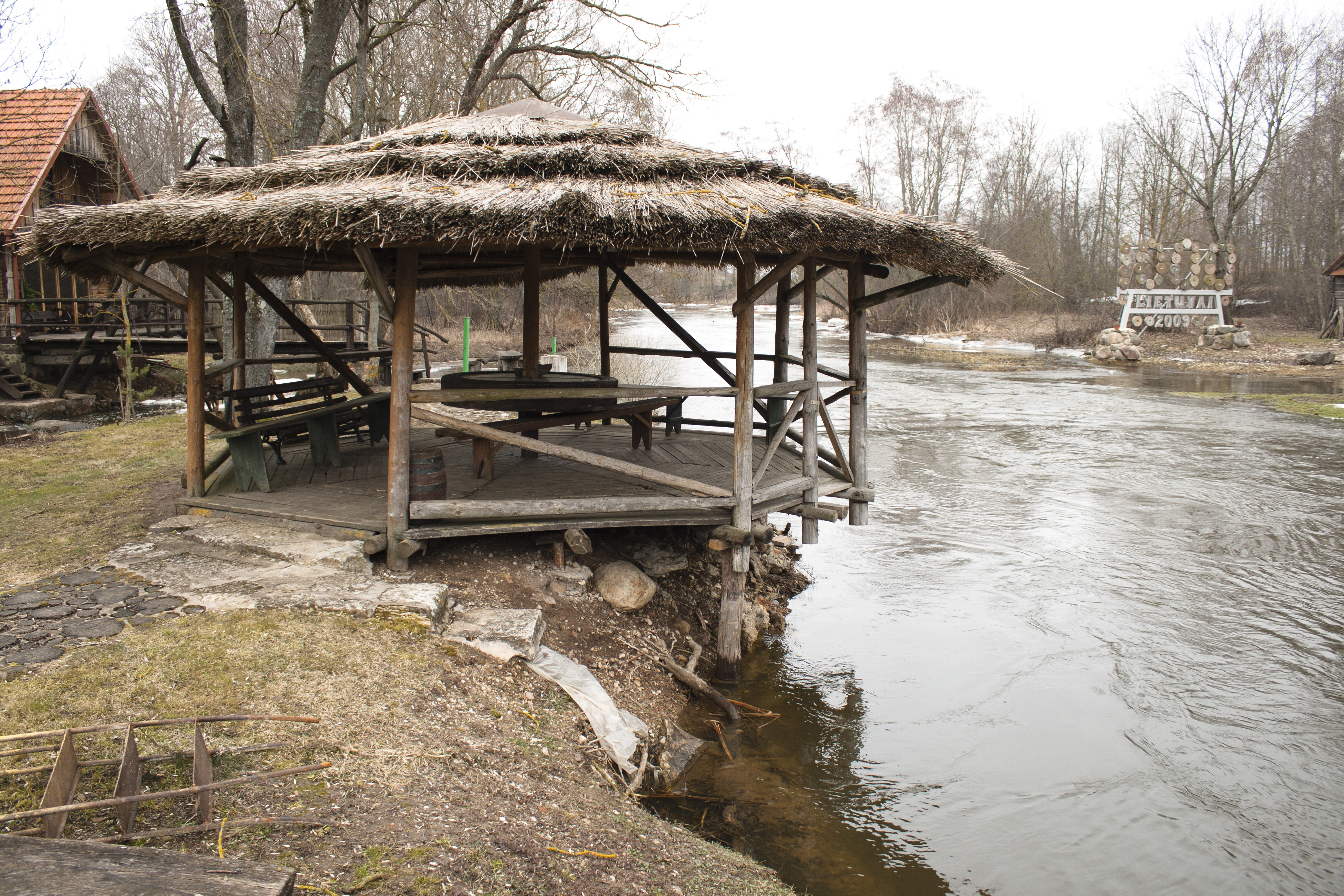 At Balsiu water mill